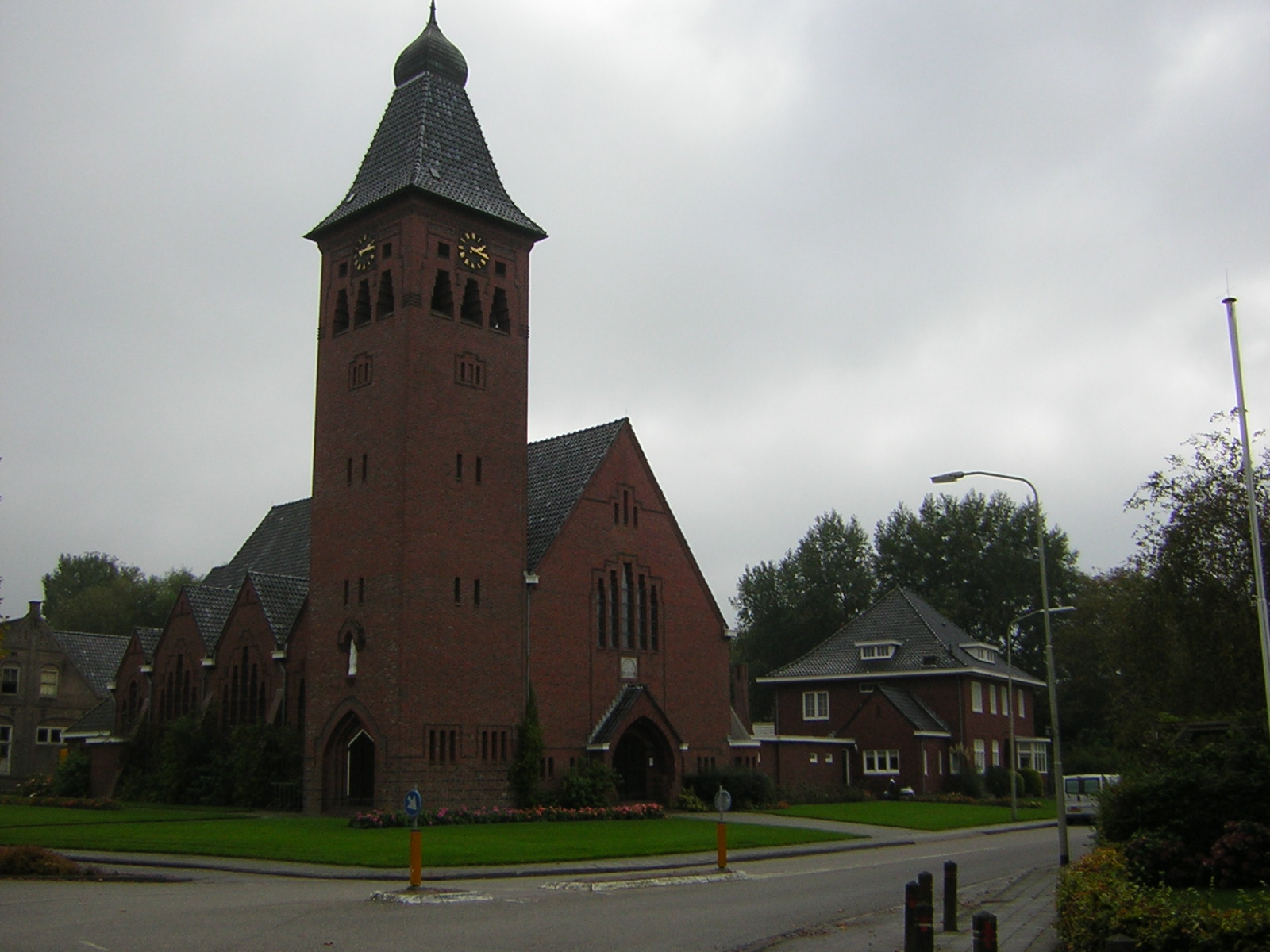 Kerk van Wehe